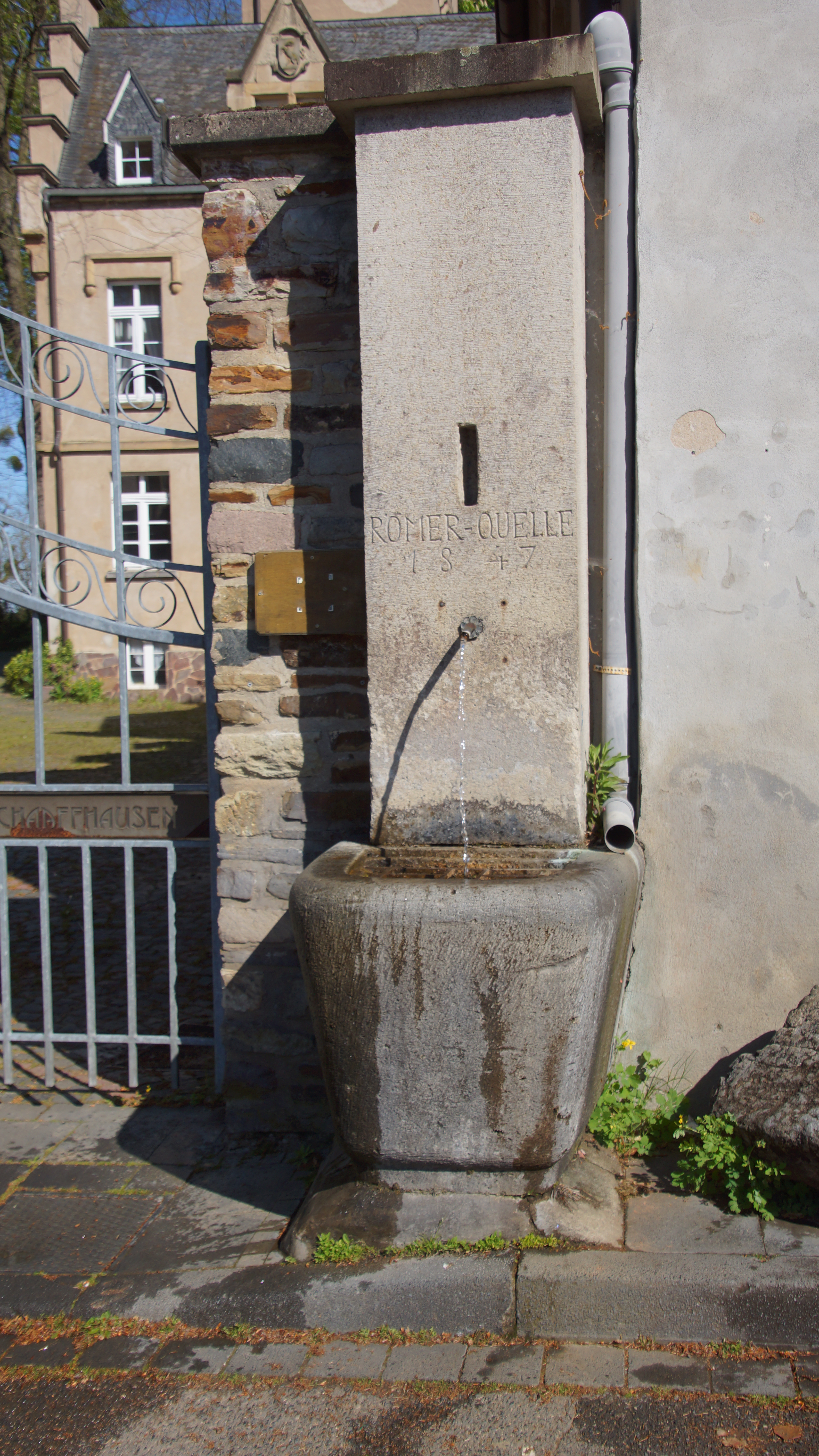 Römerquelle von 1847 an der Villa Schaaffhausen in Rommersdorf, Bad Honnef